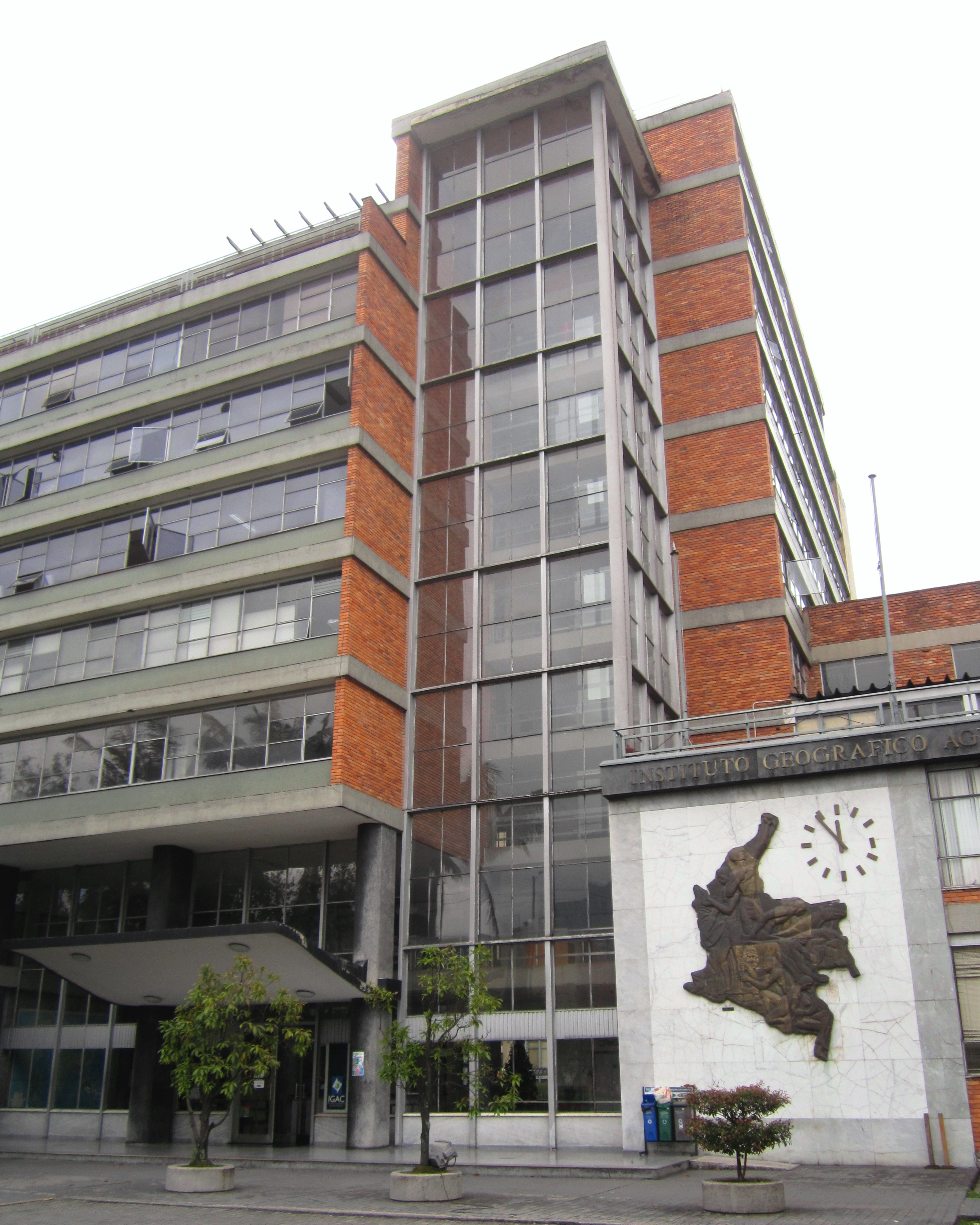 Bogotá, sede del Instituto Geográfico Agustín Codazzi.